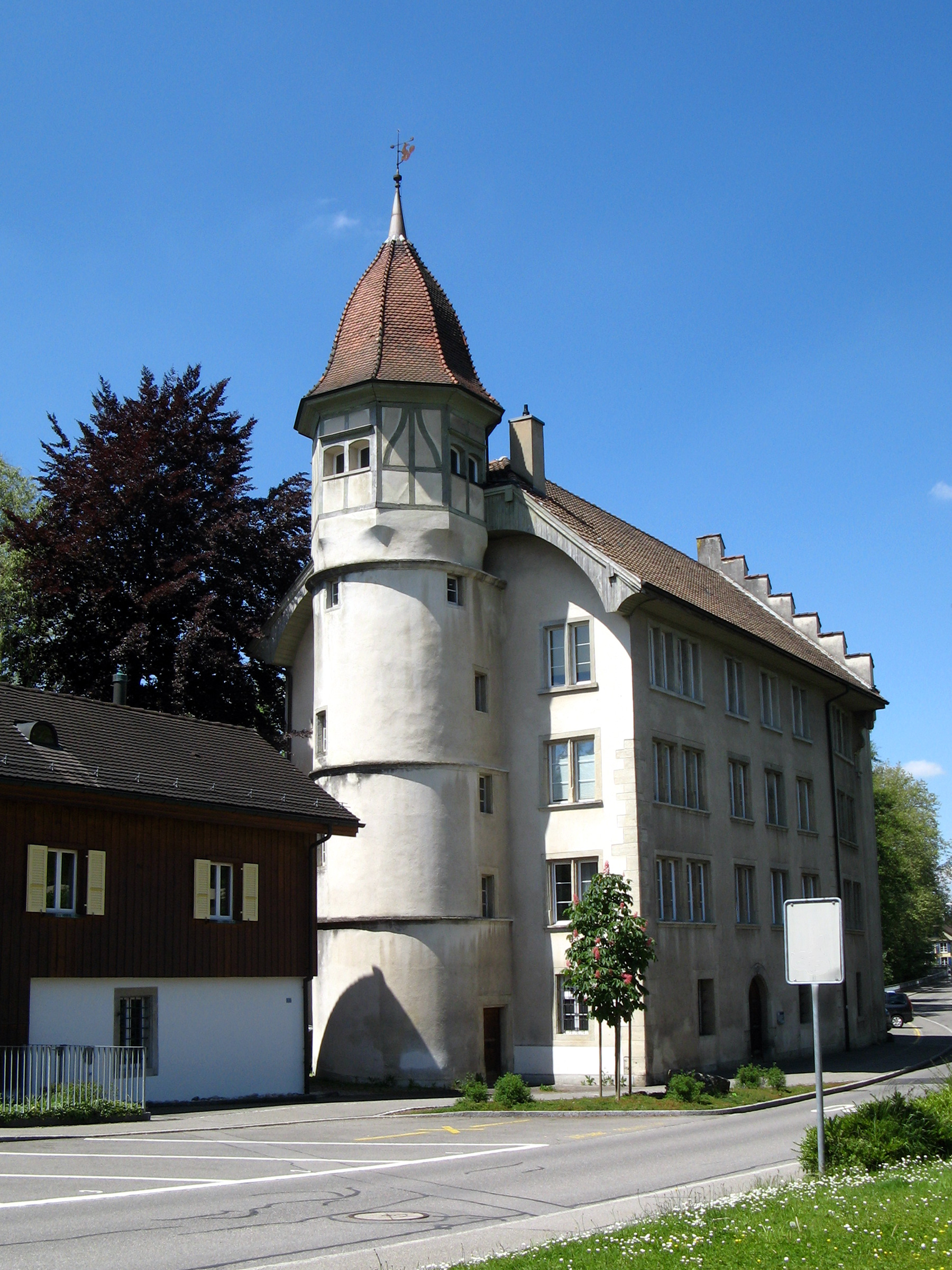 Obere Mühle an der Bachstrasse 36 in Lenzburg